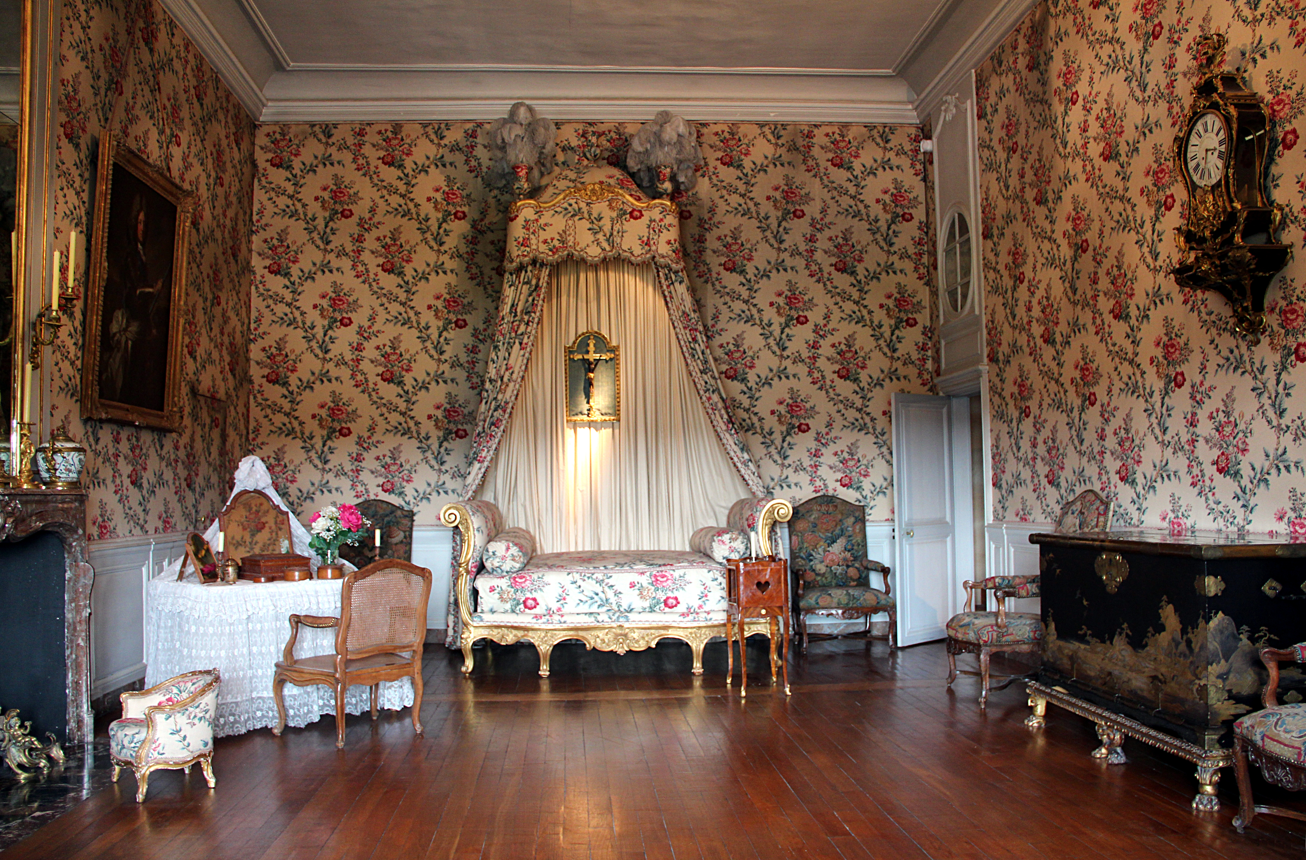 Chambre Louis XV - Château de Vaux-le-Vicomte - Maincy (Seine-et-Marne, France).